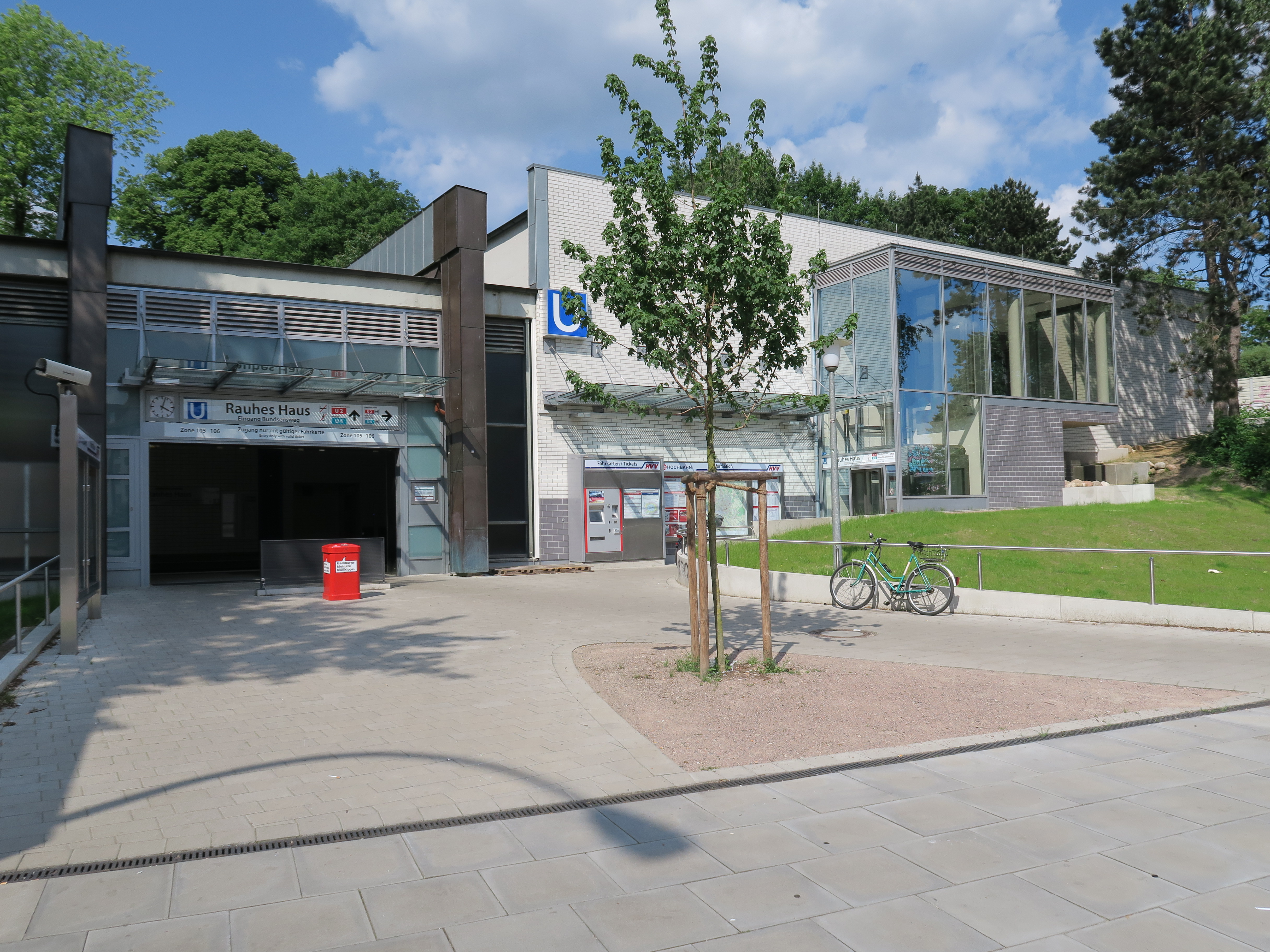 Eingang Bundsensweg vom Bahnhof Rauhes Haus in Hamburg